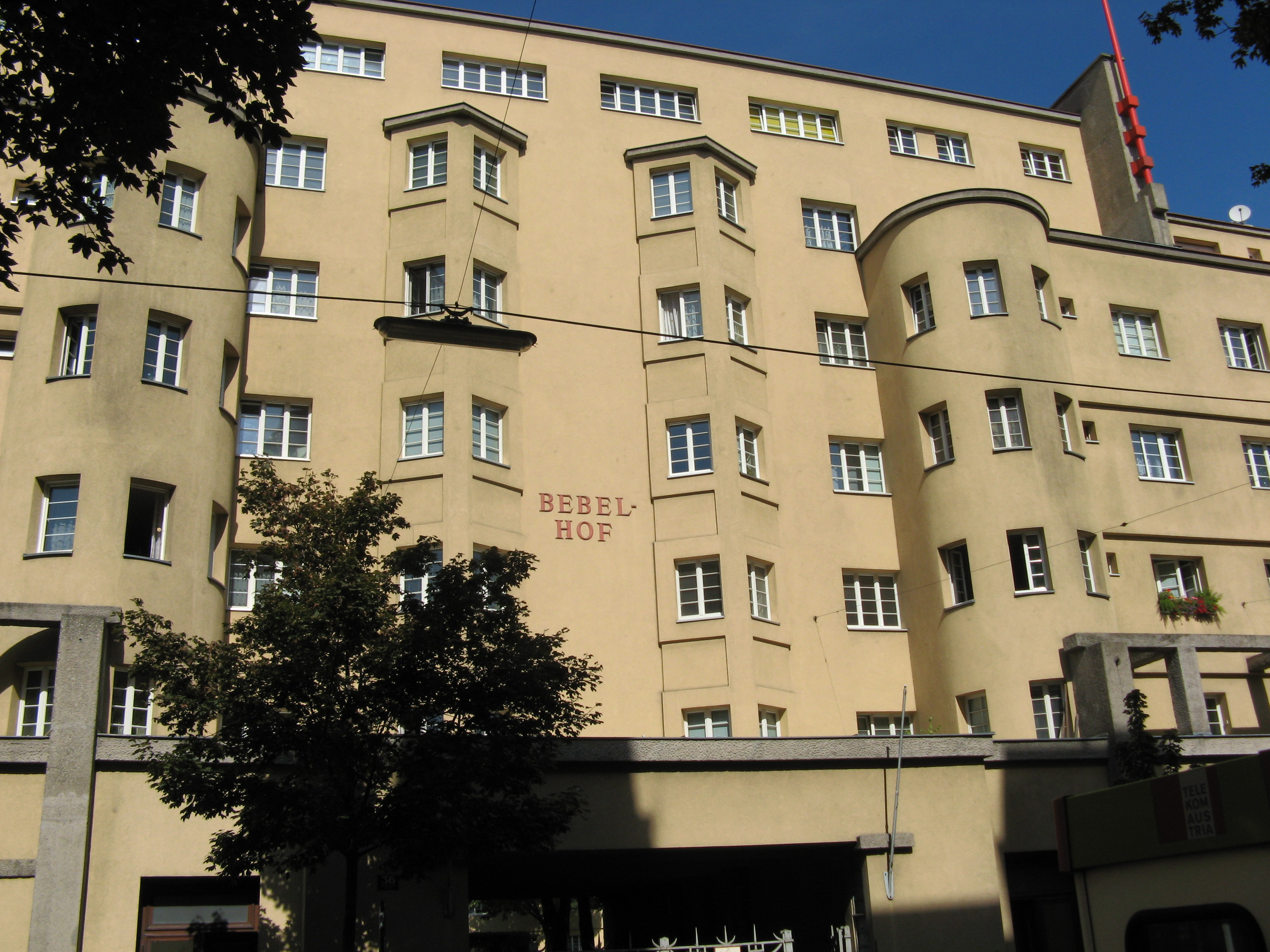 Wohnhausanlage Bebelhof (1925/26) in Wien-Meidling von Karl Ehn